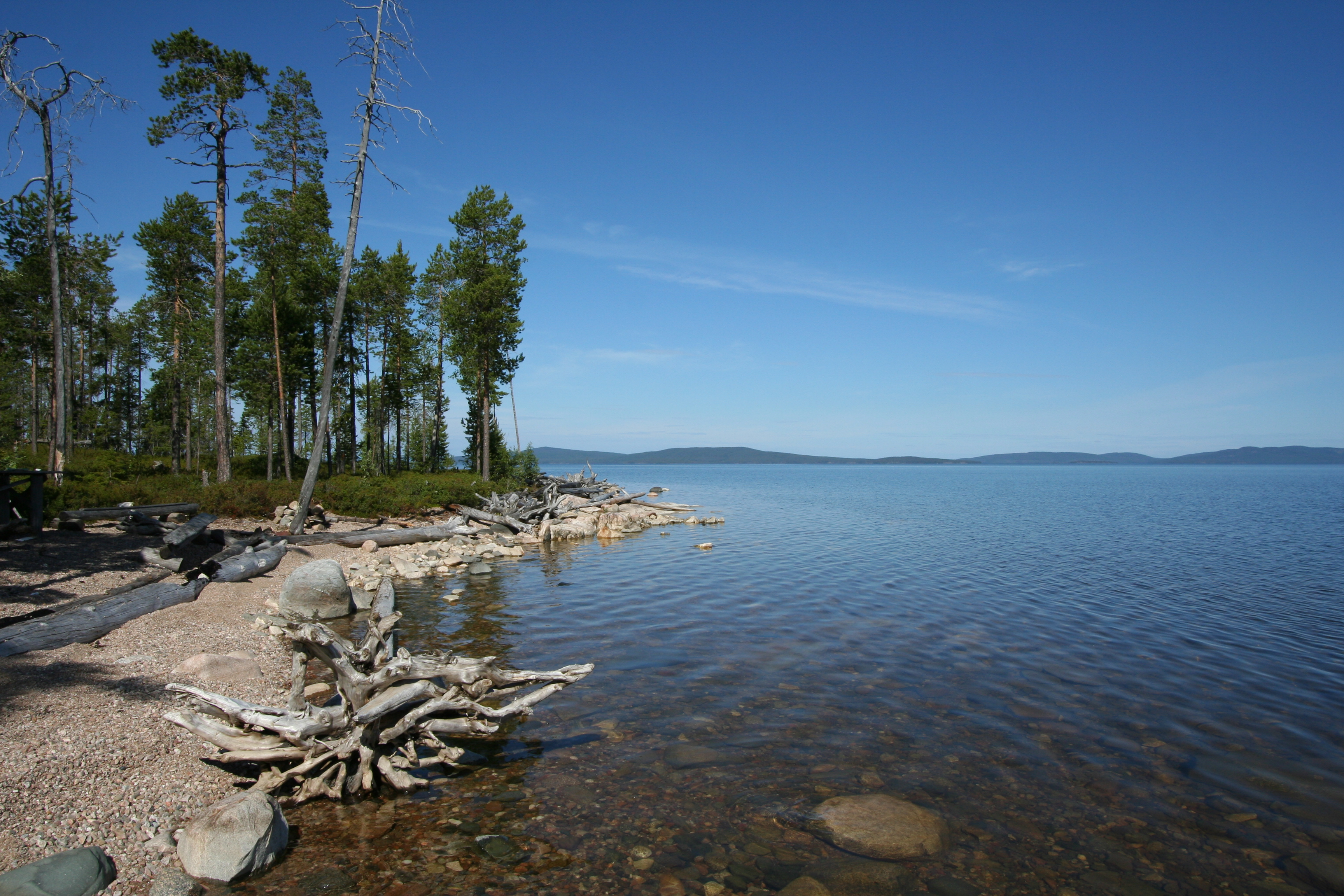 о.Вуошкалошари